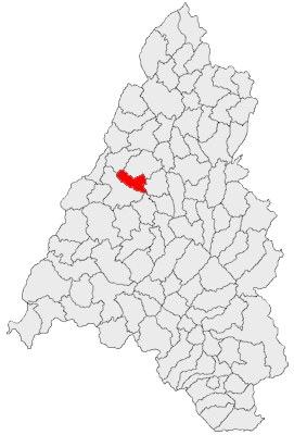 Categorie:Hărţi ale judeţului Bihor